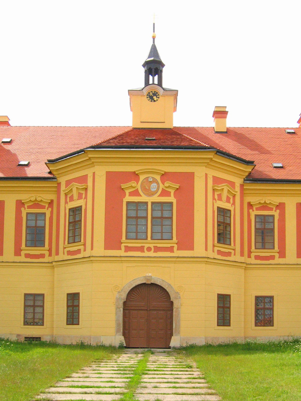 Zámek Sloupno, okres Hradec Králové. Střední rizalit východního průčelí.